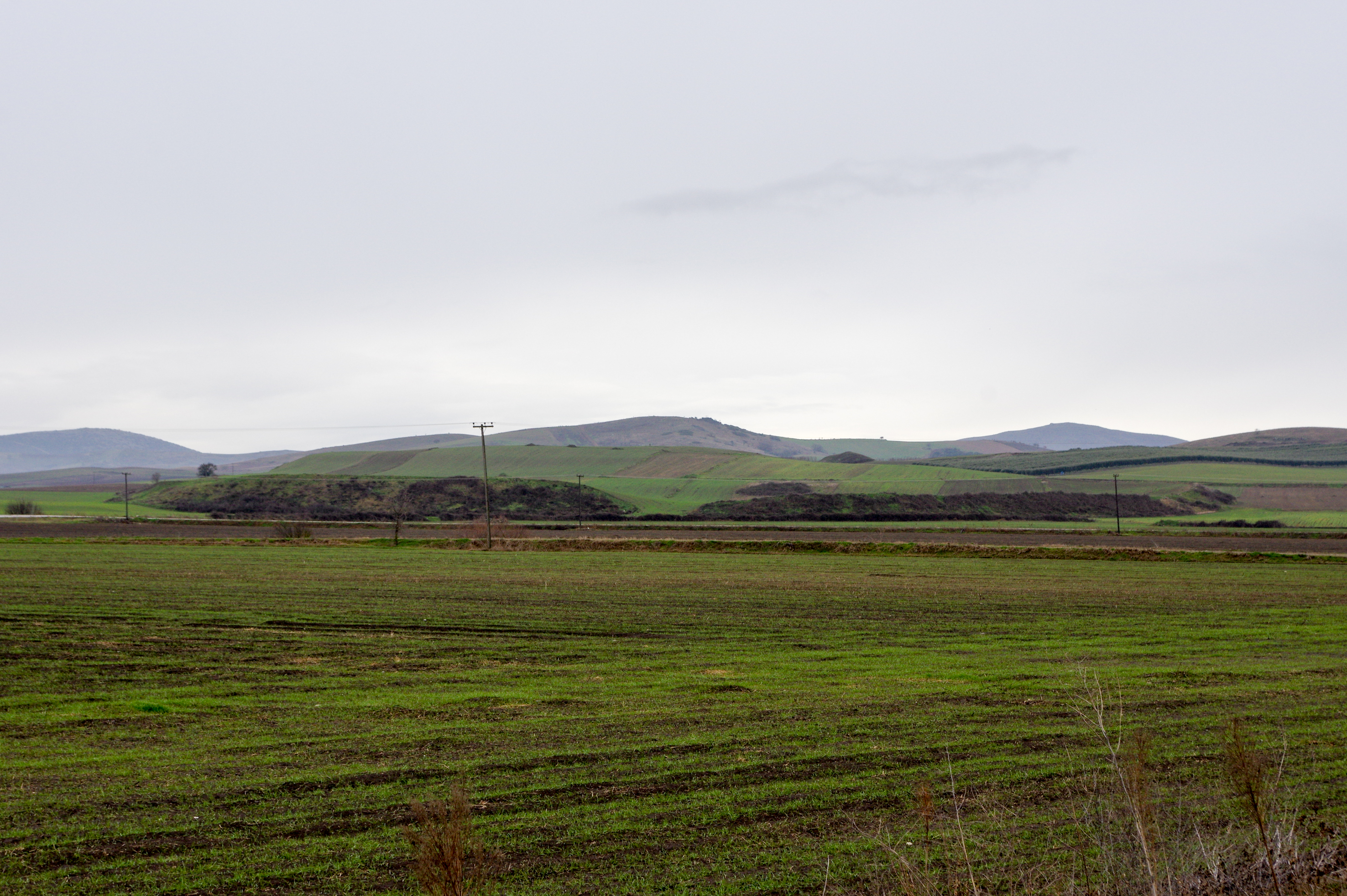 The archaeological site of Palealarisa, identified as that of the ancient Thessalian city of Krannon.